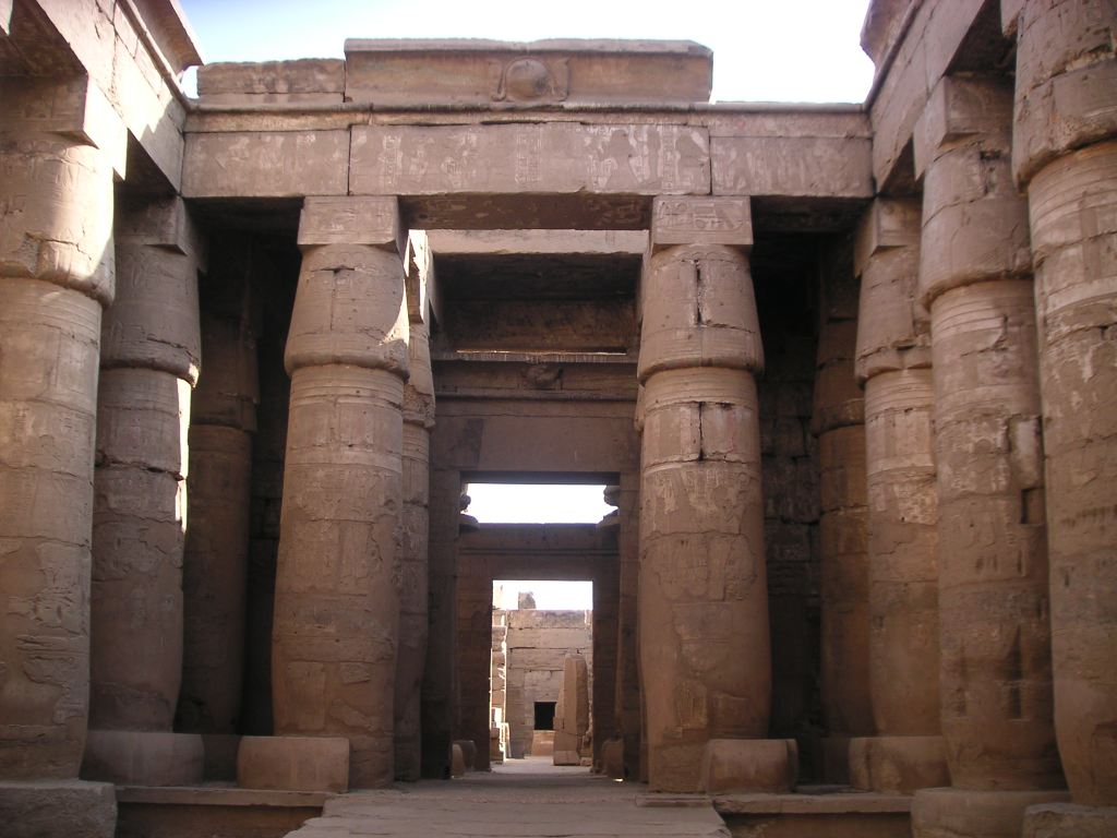 Vue de la cour du temple de Khonsou de Karnak, dont la décoration a été achevée par le grand prêtre d'Amon, Hérihor - XXe et XXIe dynasties égyptiennes